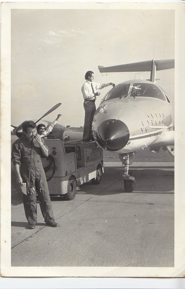 Guido Pessotti (a direita) preparando a aernonave Xingu EMB-121 para vôo de ensaio aerodinâmico. Engenheiro de Ensaio em Vôo Hyodo a frente e Engenheiro José Renato (ITA) (atrás a esquerda).